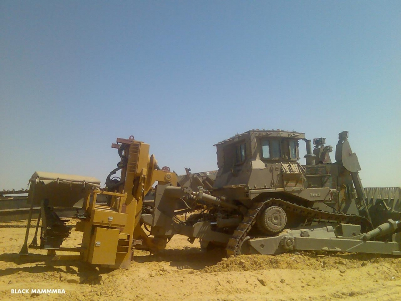 IDF D9R bulldozer with conic driller דחפור די-9 עם חודר קוני